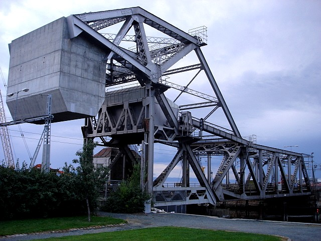 Zvedací most , Trondhaim, Norway